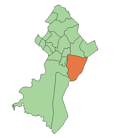 Ubicación de Itá.